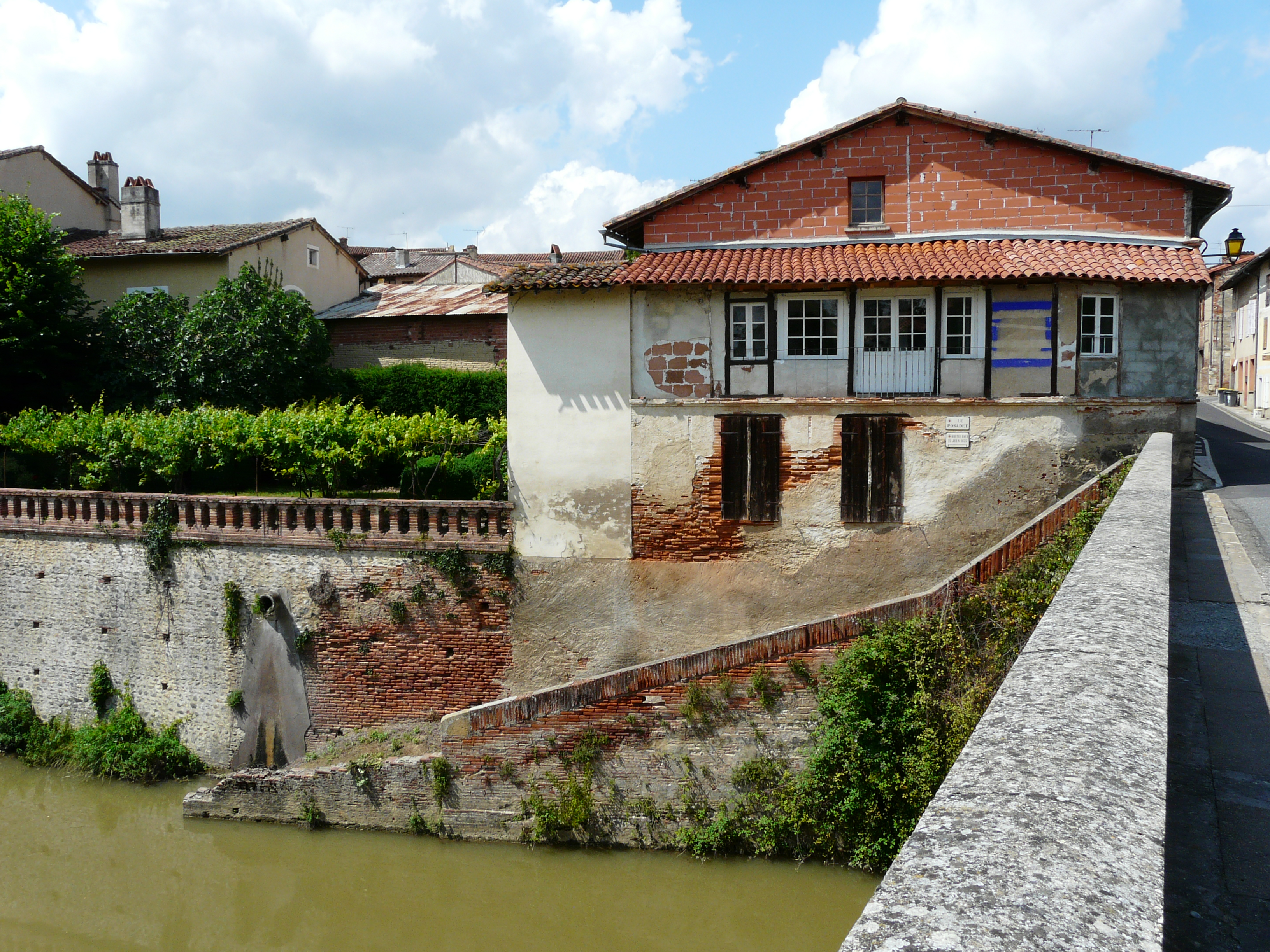 Maison située rue d'Auriac, en bordure de l'Arize, Rieux-Volvestre, Haute-Garonne, France. Un témoin de la crue du 23 juin 1875 est apposé sur son mur.